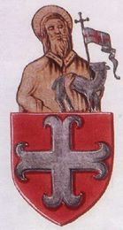 Emblème de Saint Jean